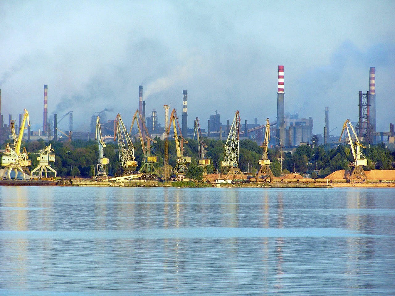 Вид на заводы со стороны Днепра